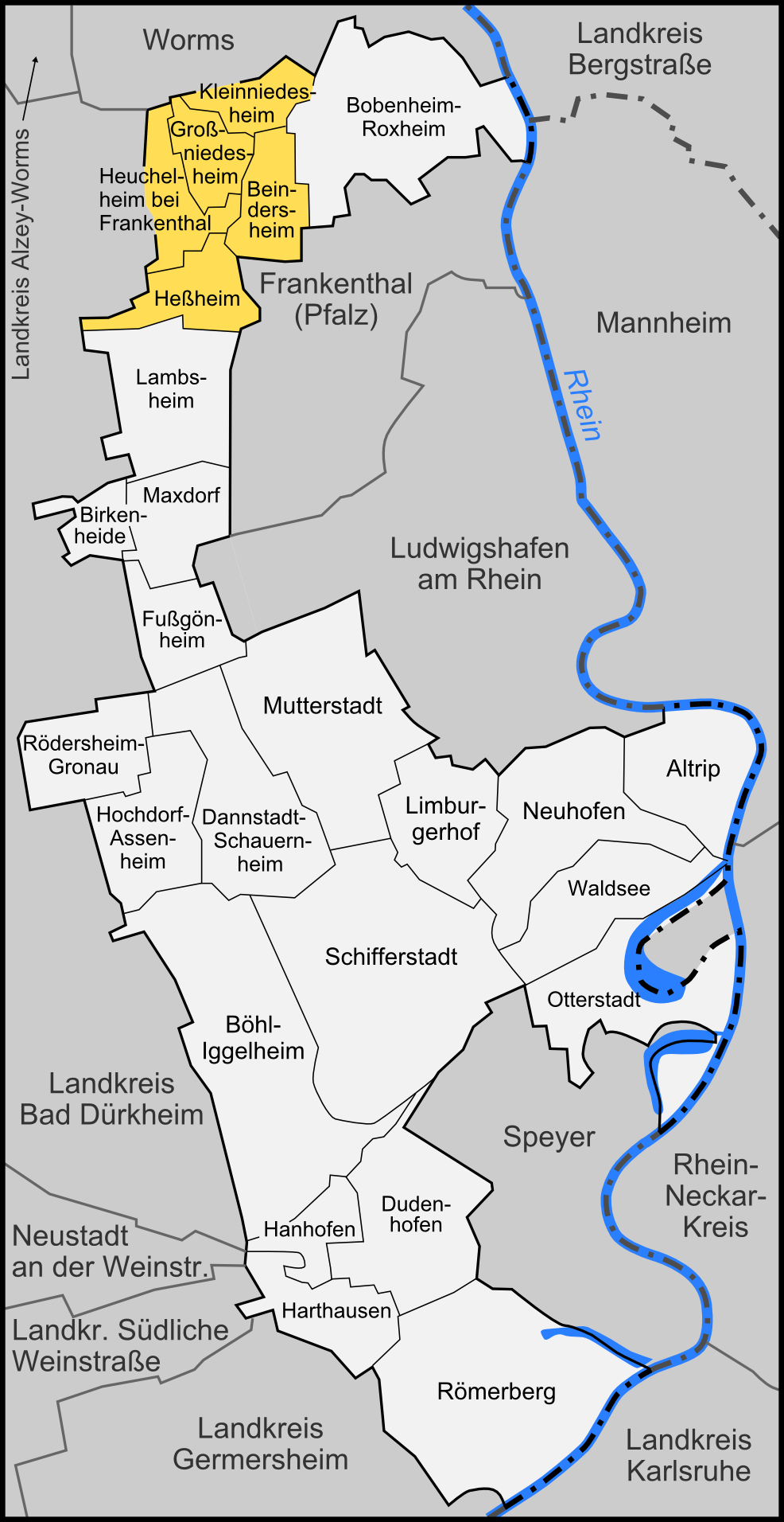 Karte der Verbandsgemeinde Heßheim im Rhein-Pfalz-Kreis